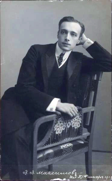 Владимир Васильевич Максимов